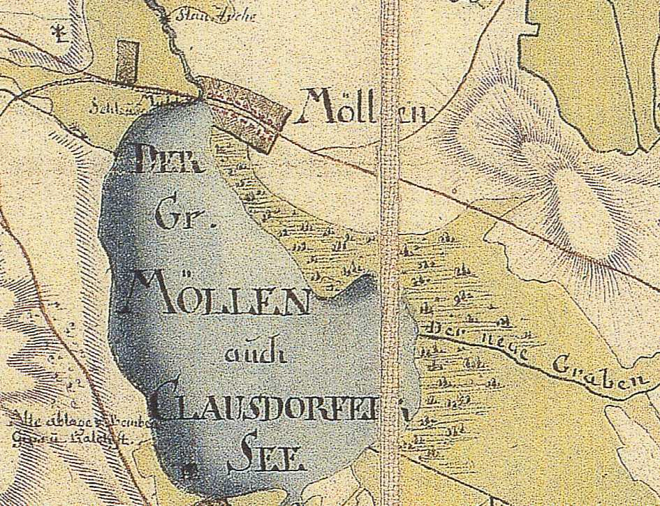 Karte von Mellensee (Ortsteil der Gem. Am Mellensee, Brandenburg, Deutschland), aus den Jahren 1767 bis 1787, Land Brandenburg, Deutschland